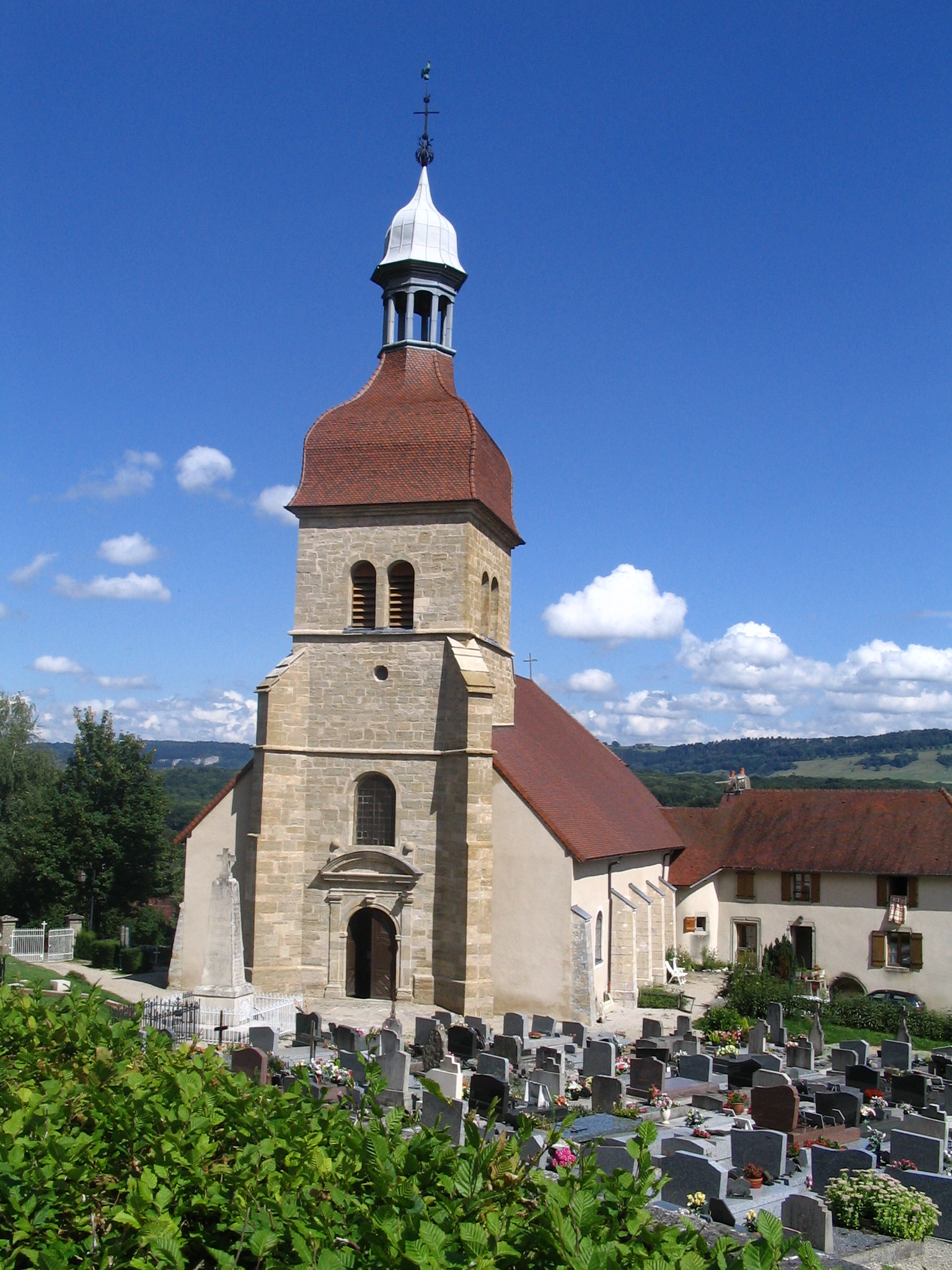 Saint-Lothain, vue générale de l'église - Jura - France